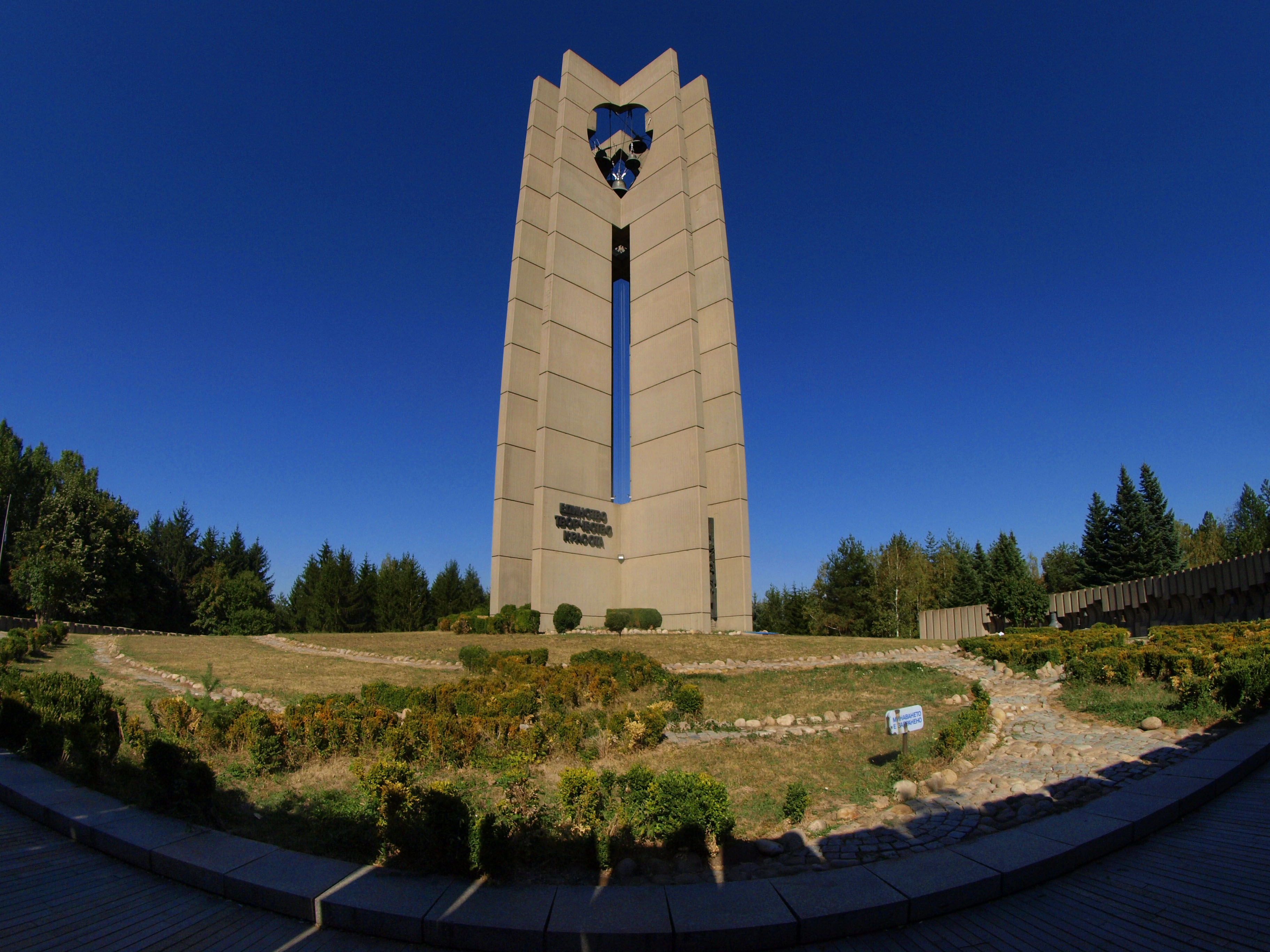 Една от най-красивите идеи на Балканите, които са се раждали през последните 30 години, е българска. Зад нея стои великата Людмила Живкова, а идеята е много проста – да направим света едно по-красиво място за живеене.